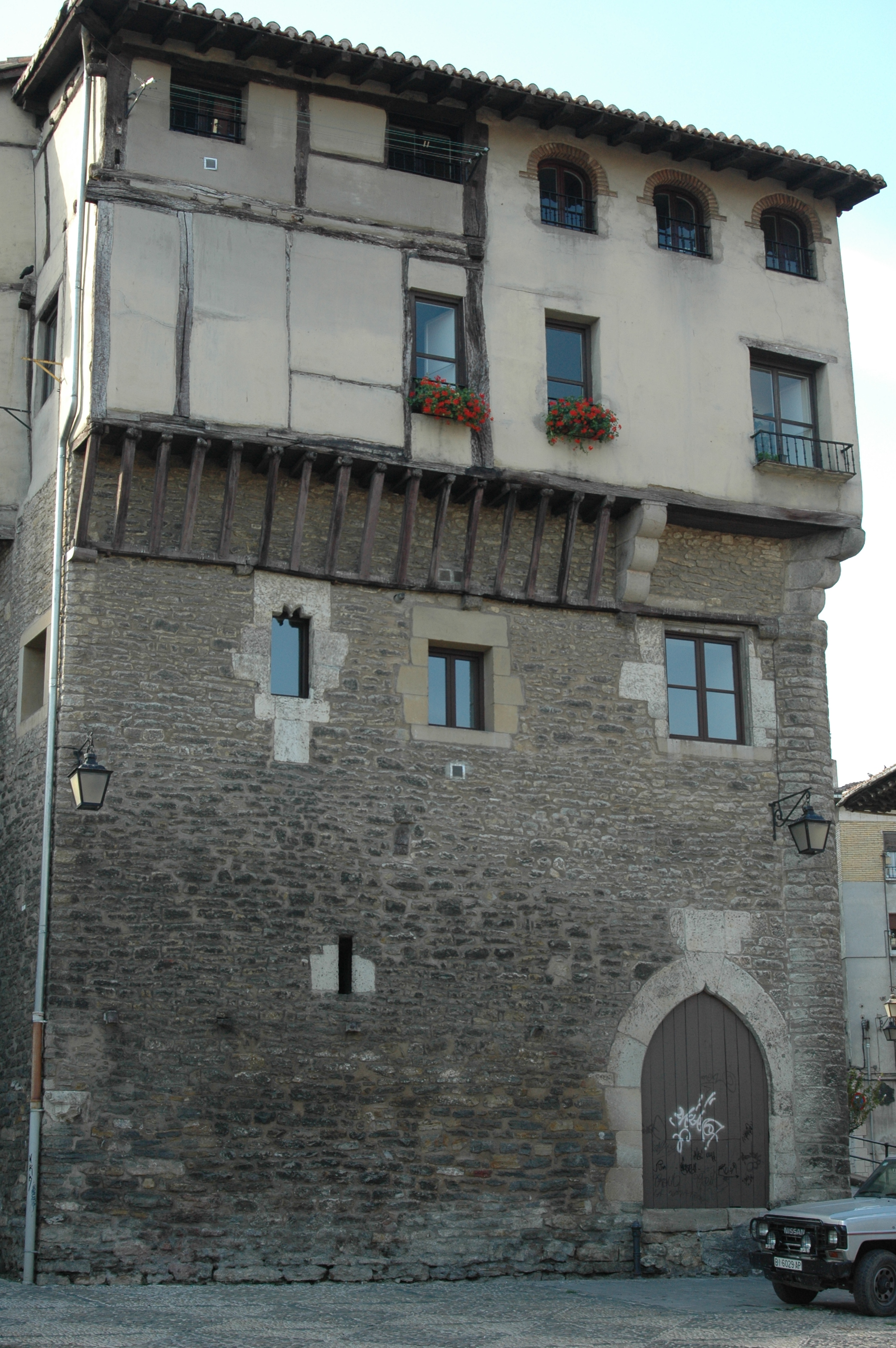 Casco Antiguo de la Ciudad